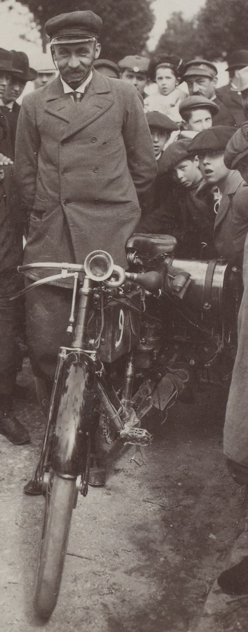 [Collection Jules Beau. Photographie sportive] : T. 13. Année 1900 / Jules Beau : F. 17. [4e Critérium des motocycles d' Étampes à Chartres, 10 mai 1900]